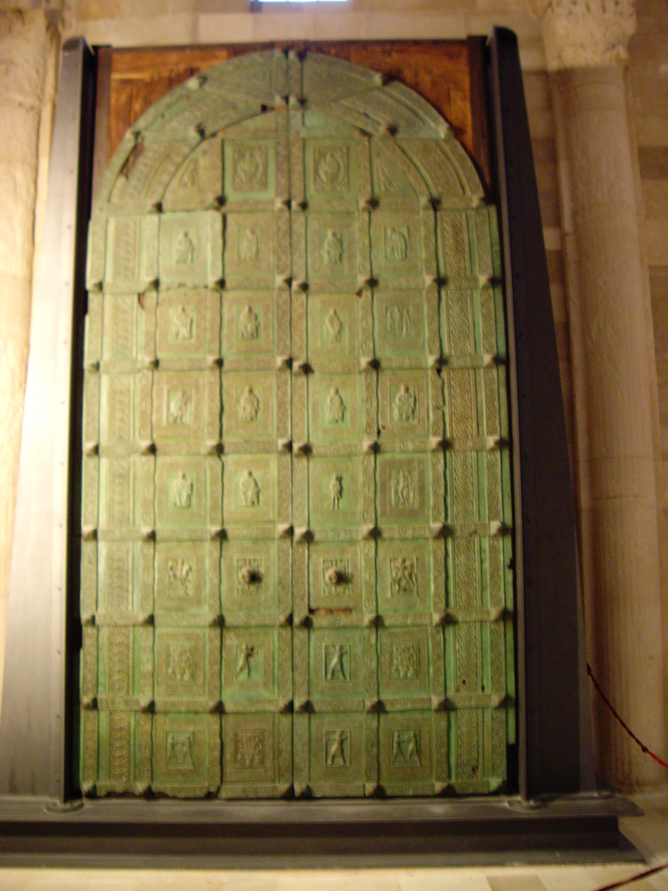 Puerta de bronce de Barisano